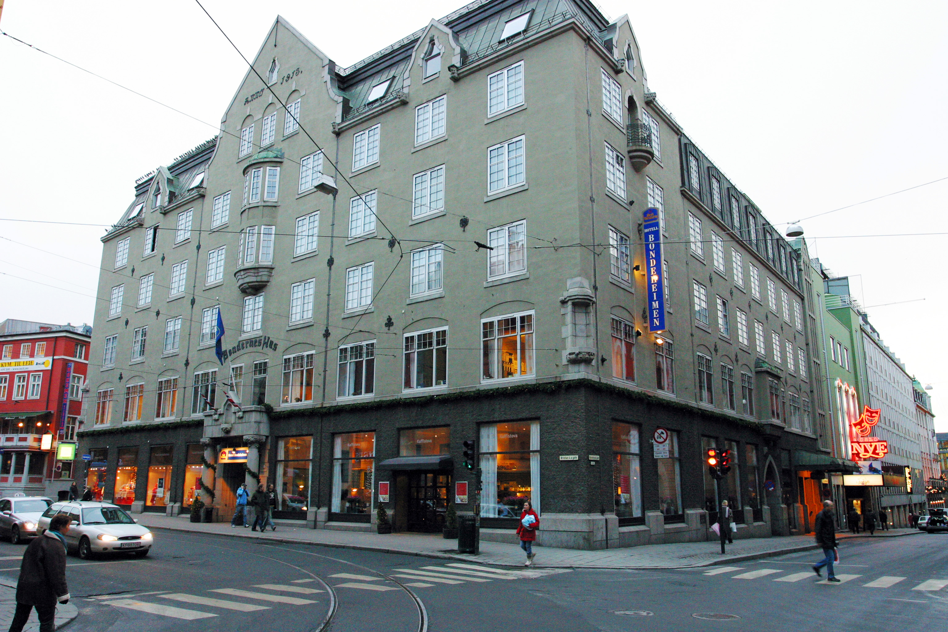 Bøndernes hus, Rosenkrantz' gate 8, Oslo. Built 1911-1913. Architects: Carl and Jørgen Berner.